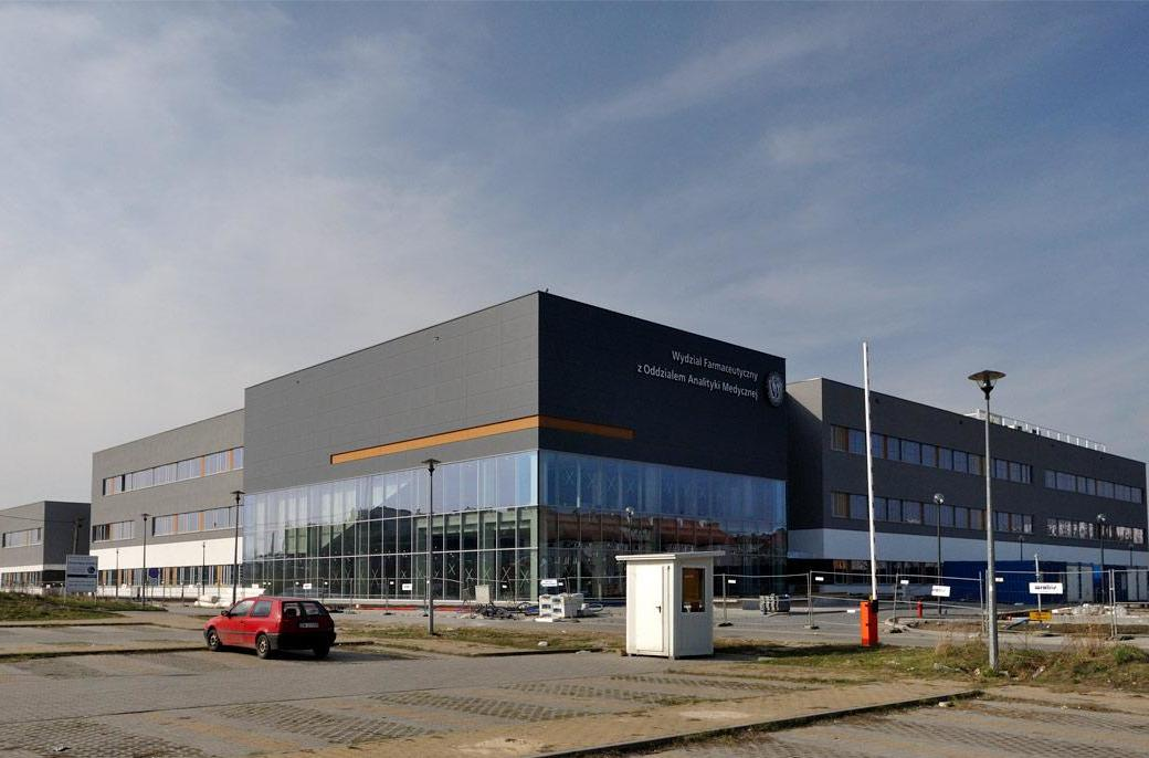 Budynek Wydziału Farmaceutycznego.